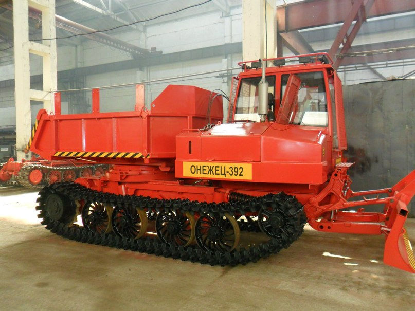 Новый трактор Онежец-392 онежских тракторостроителей